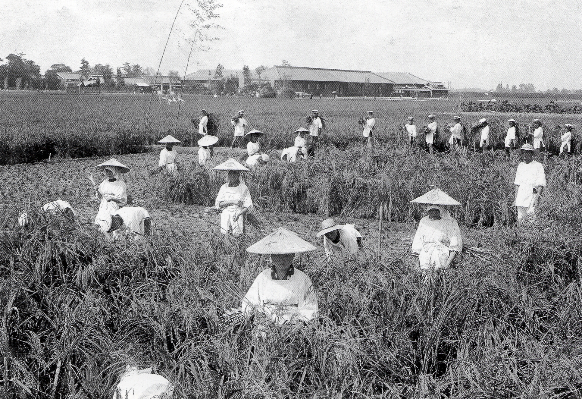 六ツ美悠紀斎田の稲わら刈り。1915年秋。